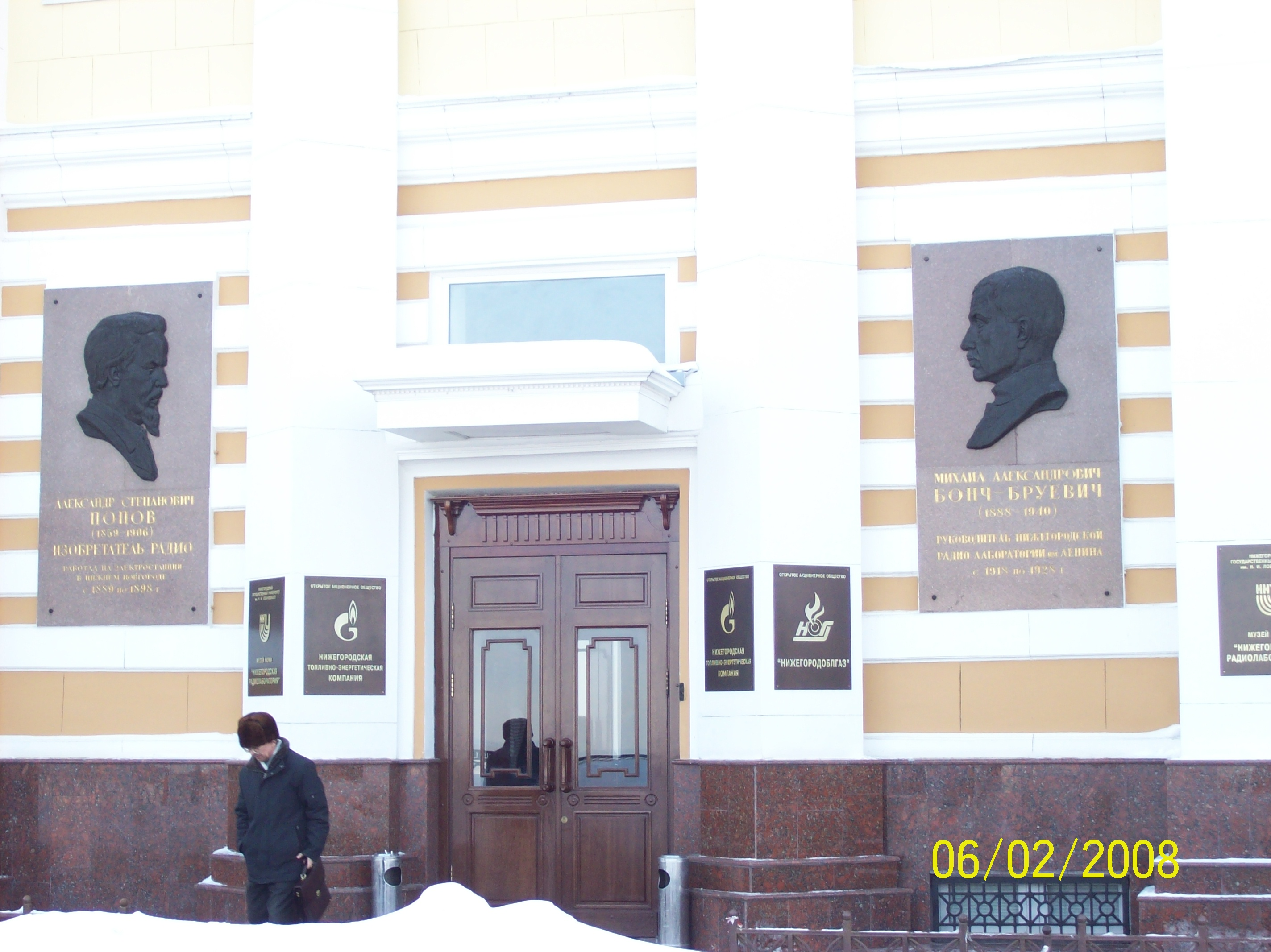 Здание, где в 1918-1928 гг. находилась созданная по инициативе В.И. Ленина Нижегородская дважды Краснознаменная радиолаборатория